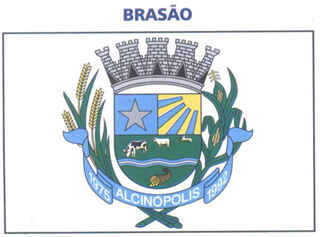 Brasão das Armas do município de Alcinópolis, no estado de Mato Grosso do Sul, Brasil.